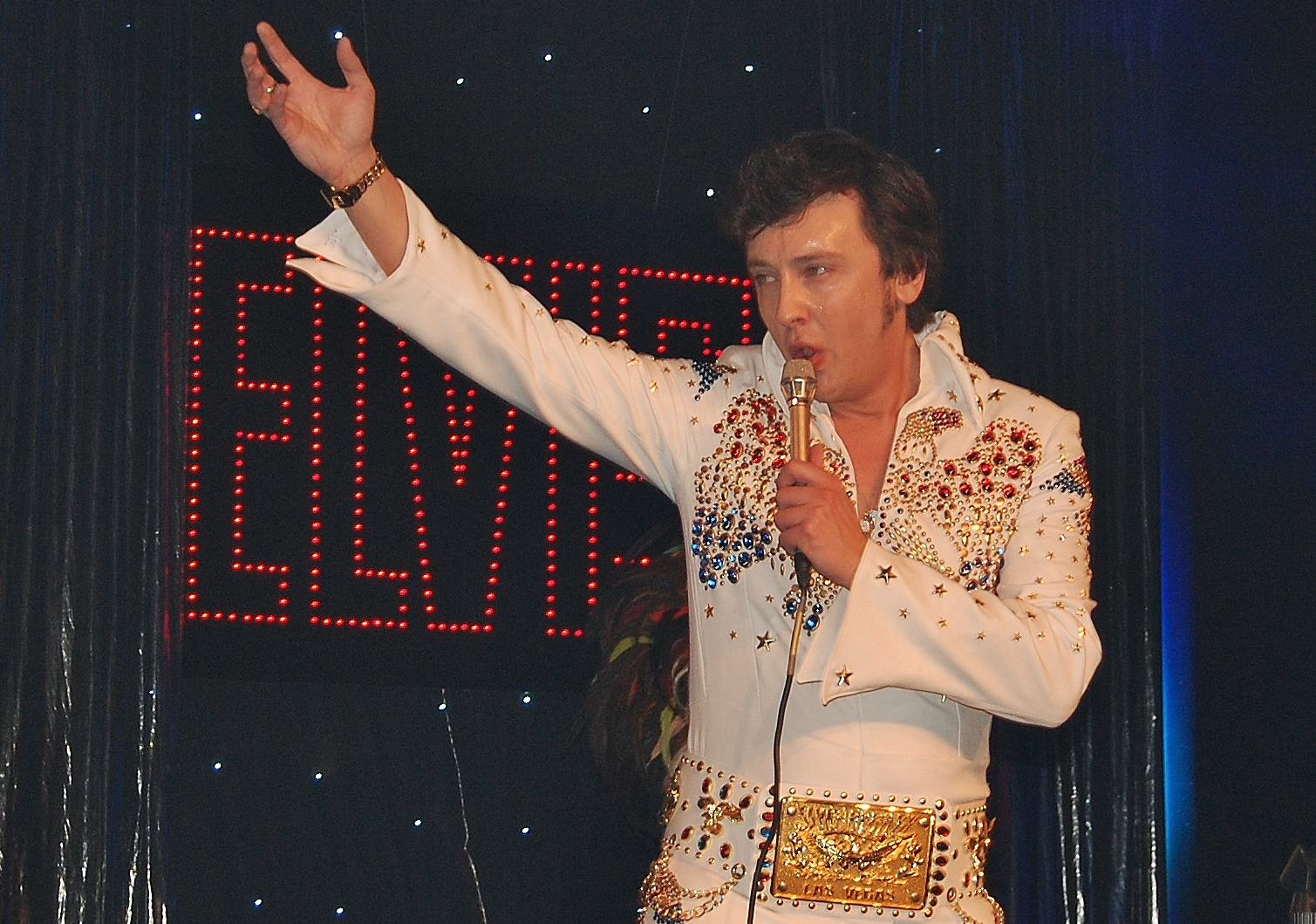 Armin Stöckl (*1983), deutscher Sänger und Entertainer, in seiner Rolle als Elvis-Double